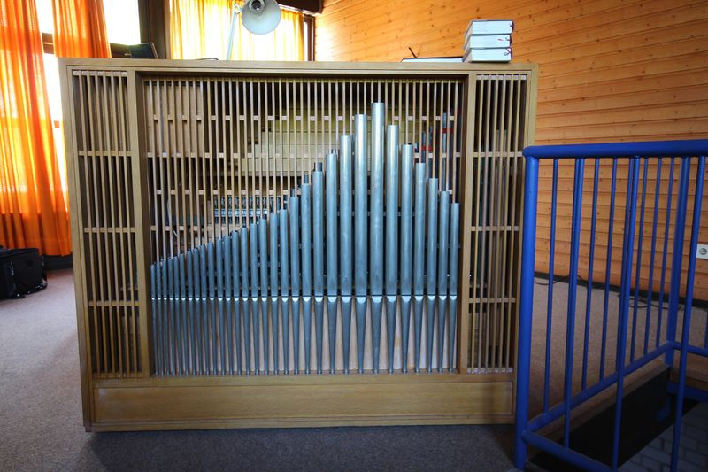 Prospekt der Walcker-Orgel in der katholischen Thomaskapelle des Ökumenischen Zentrums Thomaskirche zu Marburg-Richtsberg